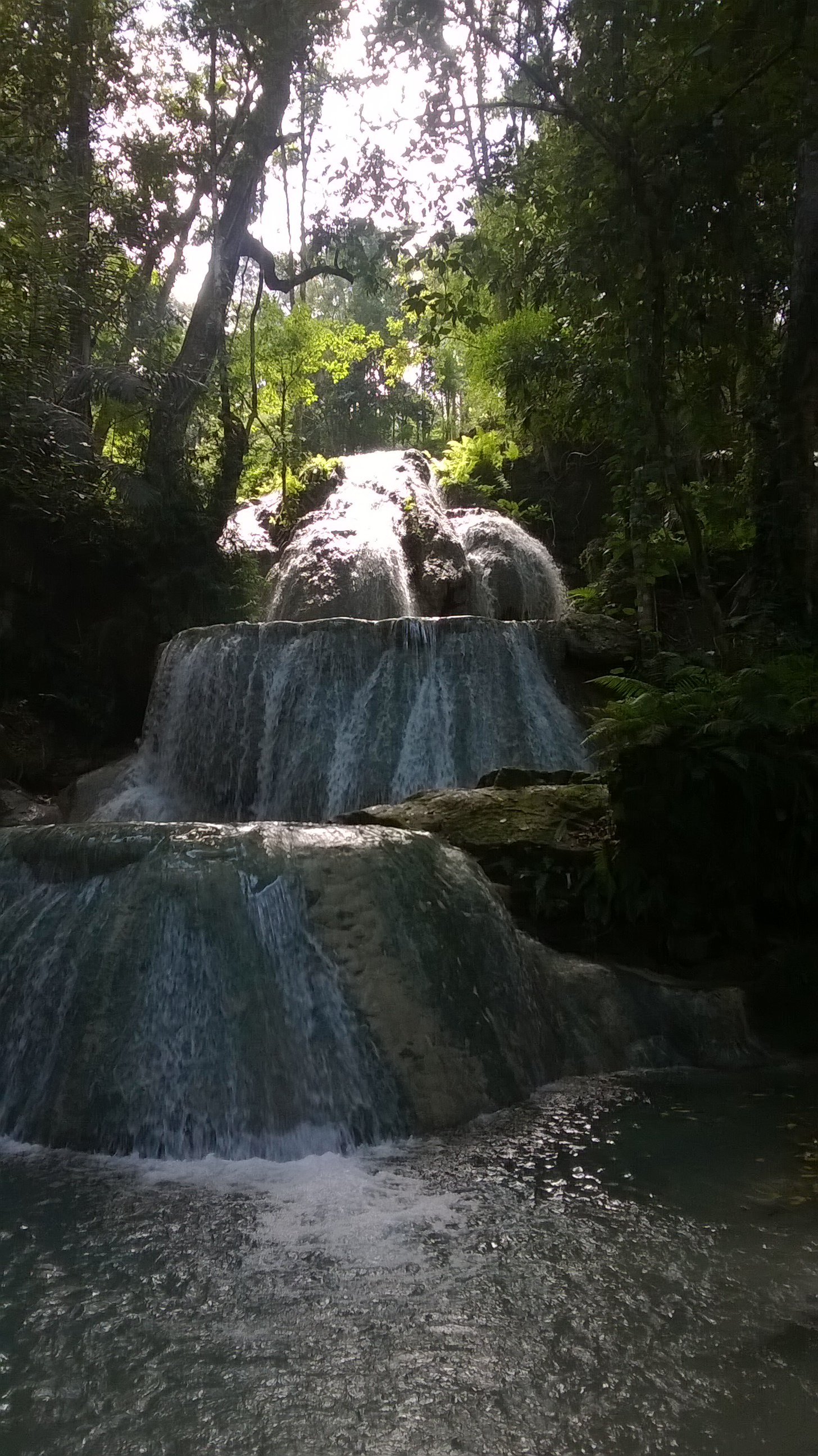 Oelekam, Central Mollo, South Timor Tengah Regency, East Nusa Tenggara, Indonesia